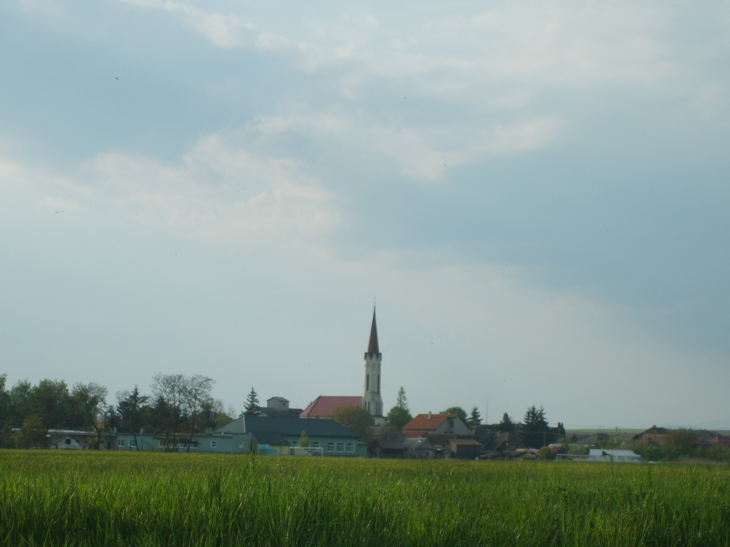 Sajólénártfalva látképe